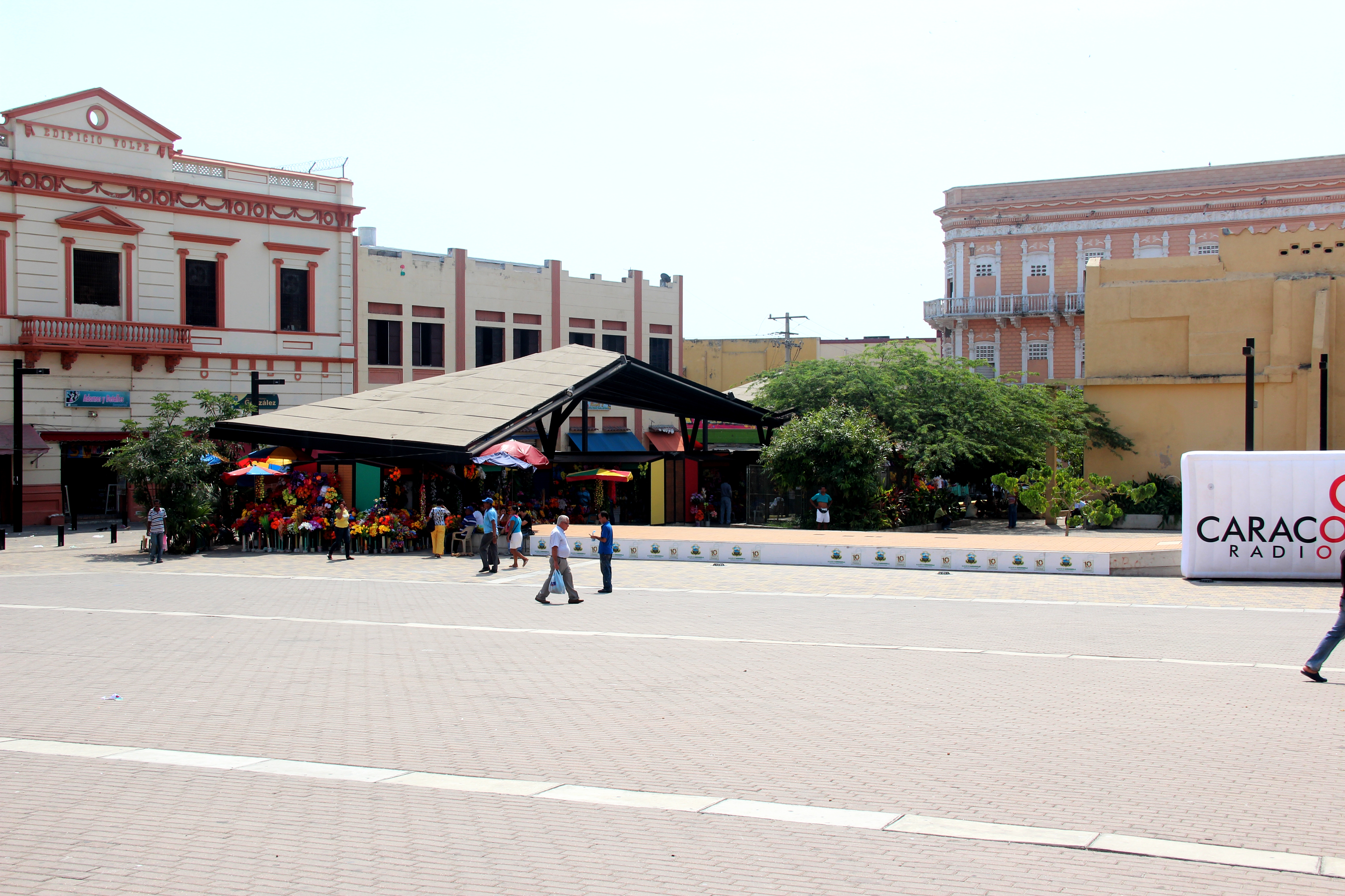 Plazoleta renovada frente a la Iglesia de San Nicolás de Tolentino en la ciudad de Barranquilla